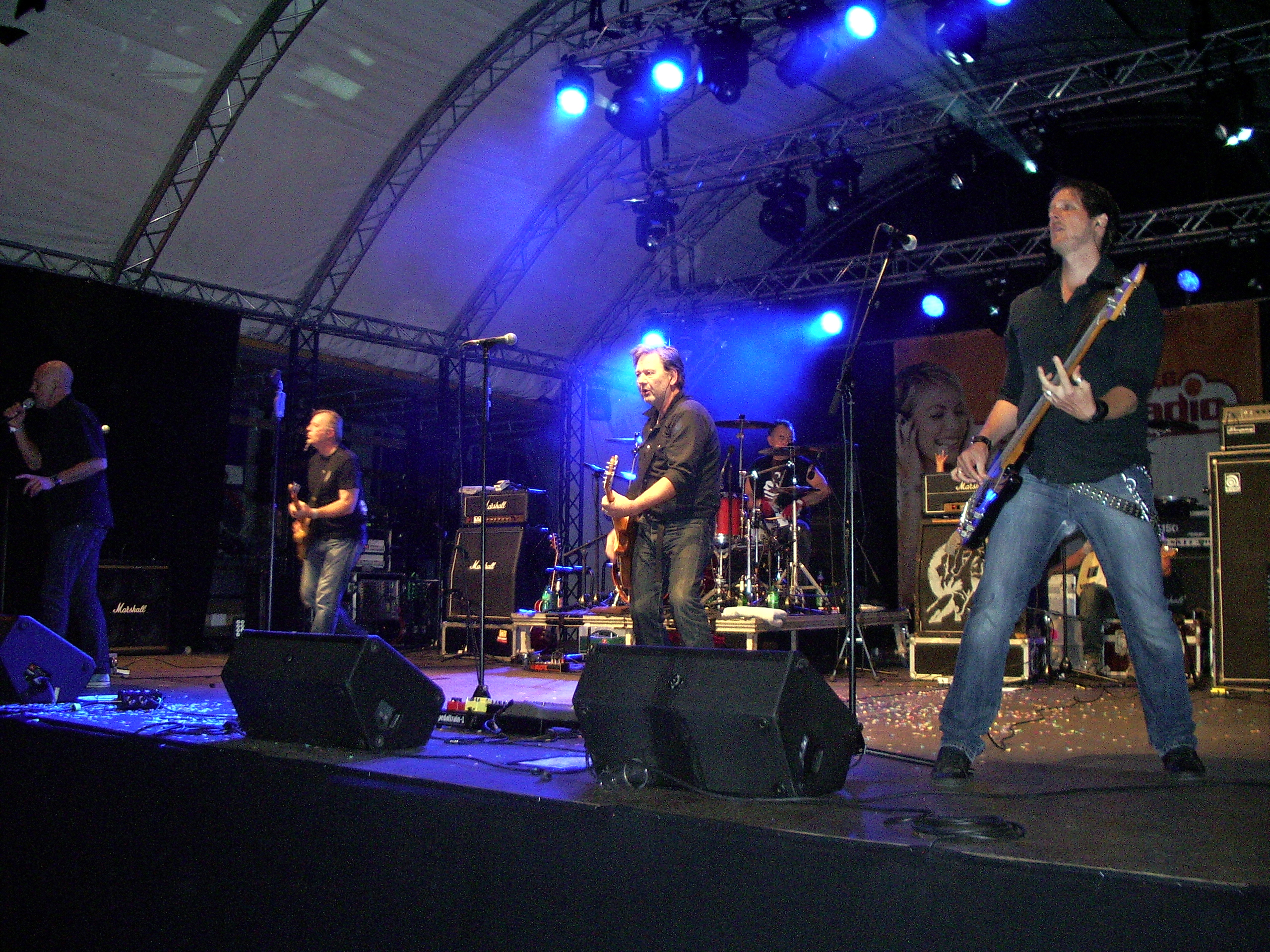 Extrabreit beim Tower-Festival auf dem Flugplatz Uetersen-Heist